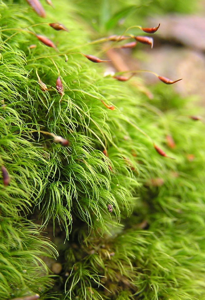 Dicranella heteromalla auf dem Lehm einer Waldwegböschung. Bei Schladern an der Sieg (Deutschland).